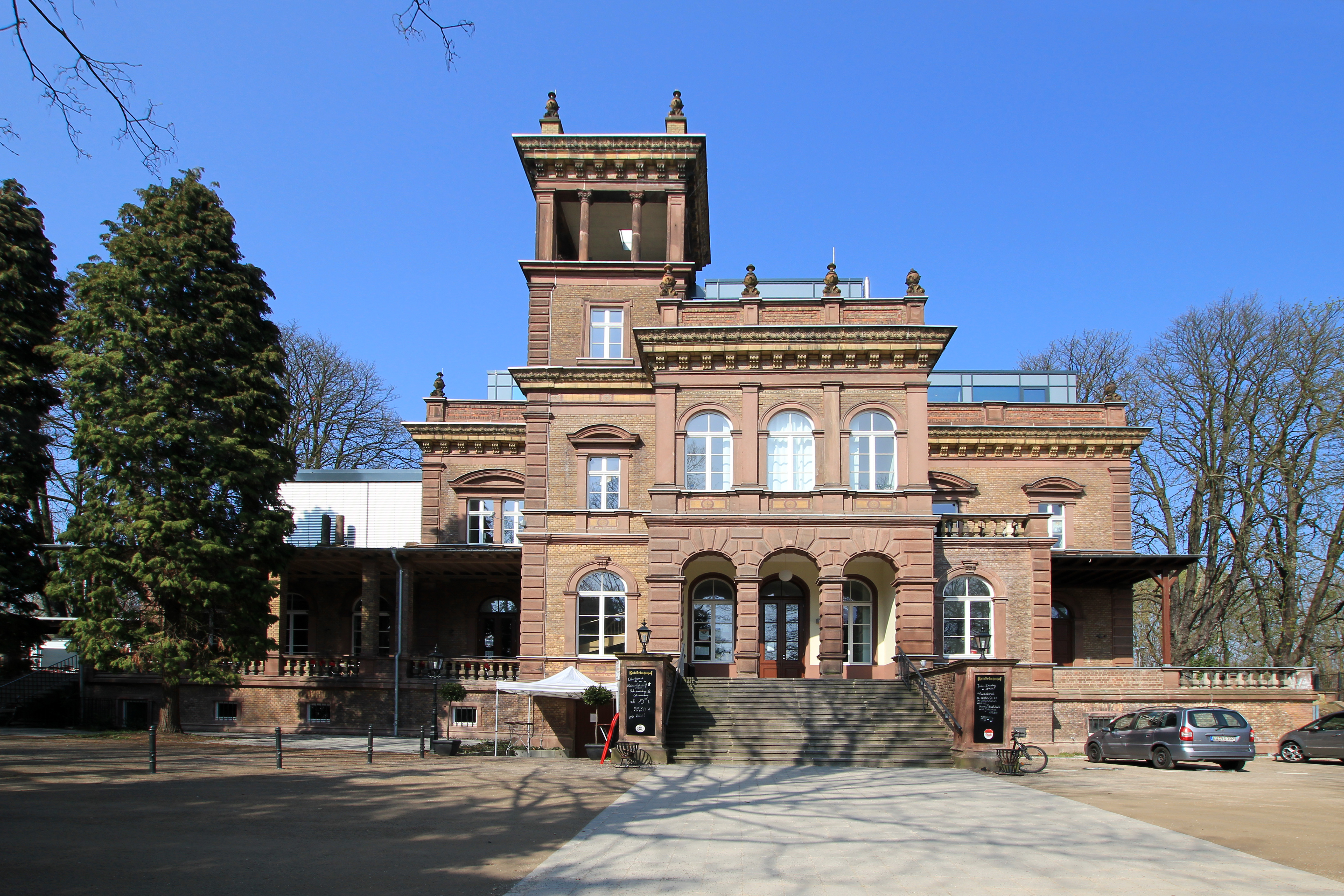 Brühl-Kierberg, Kaiserbahnhof von 1877